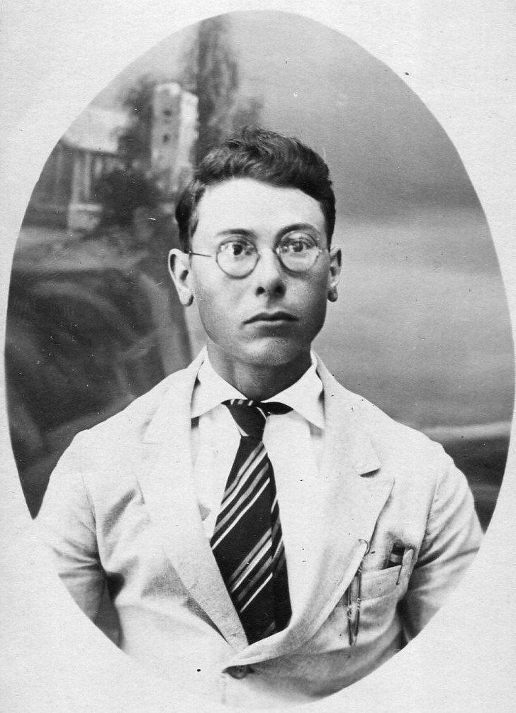 Foto van Kees Ven op 33 jarige leeftijd.